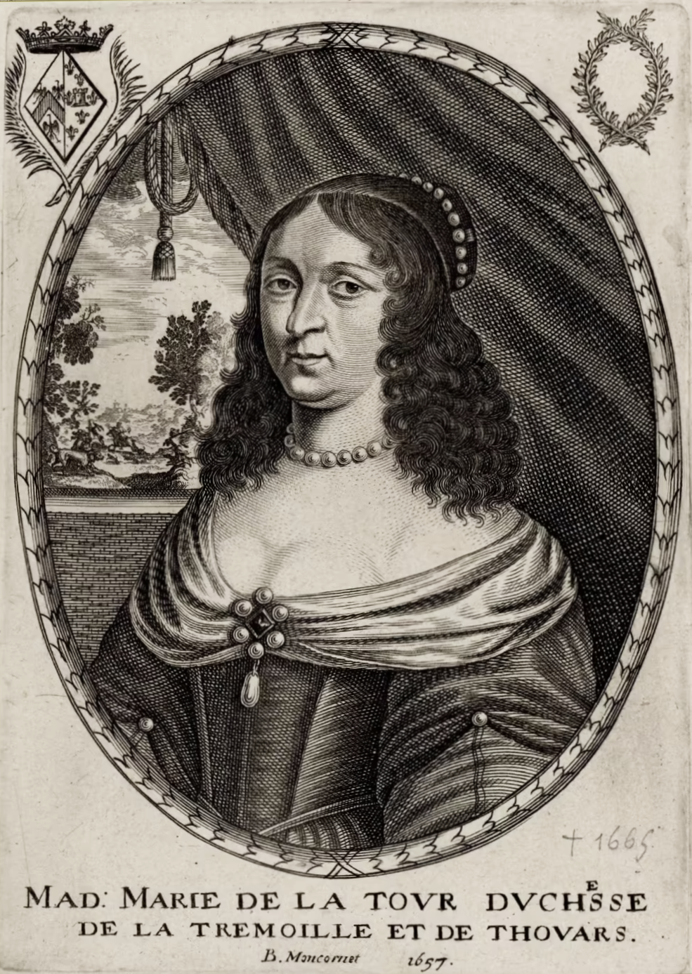 Marie de La Tour, née le 17 janvier 1601 à Turenne, est la fille de Henri duc de Bouillon (1555-1623) et de sa seconde épouse, Élisabeth de Nassau-Orange (1577-1642)